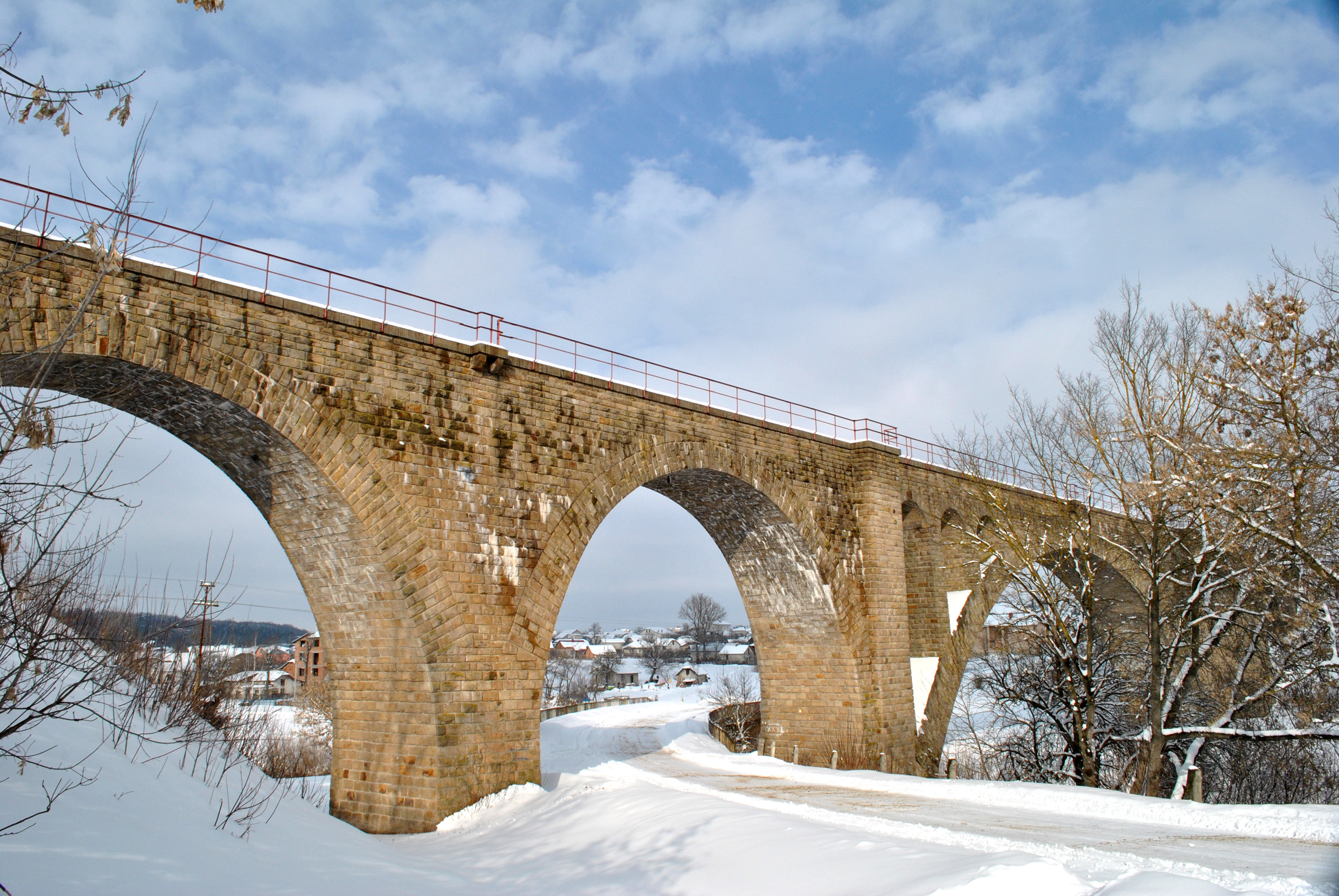 Залізничний міст у селі Буцнів Тернопільського району Тернопільської області.